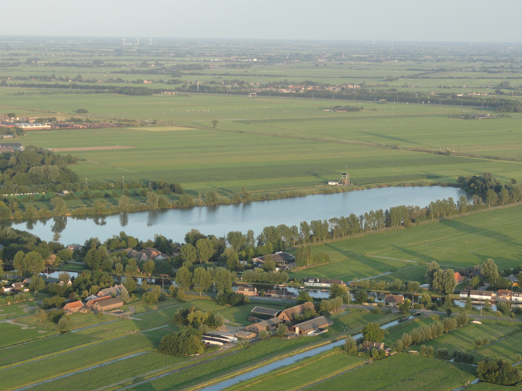 Put van Broekhoven